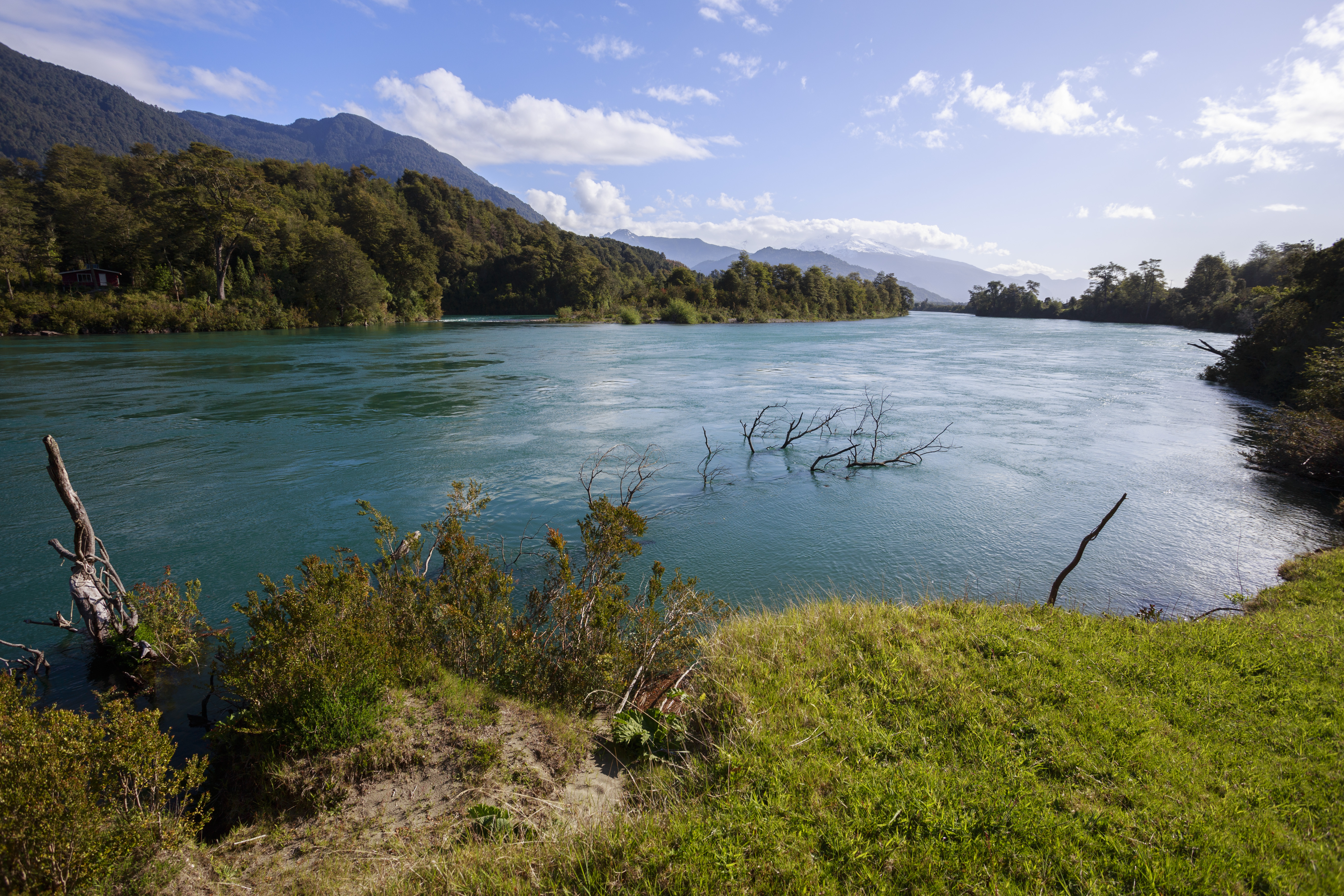 sector las gualas, cochamó